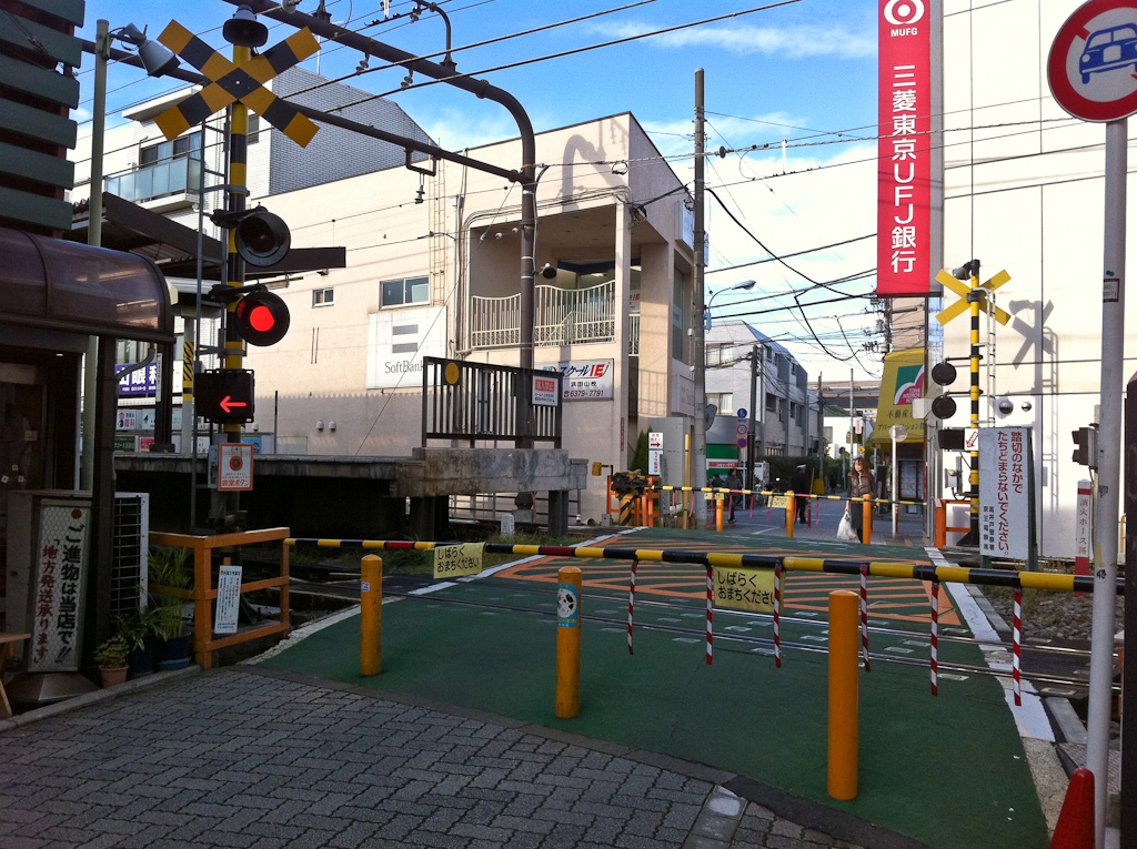 中文（台灣）: Tokyo, Japan 井王井之頭線濱田山站，澀谷端月台鄰接著的行人專用平交道。